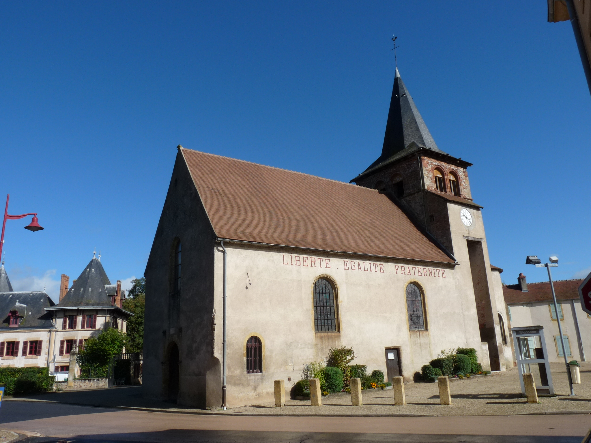 Kirche von Pierrefitte-sur-Loire, Frankreich, Département Allier